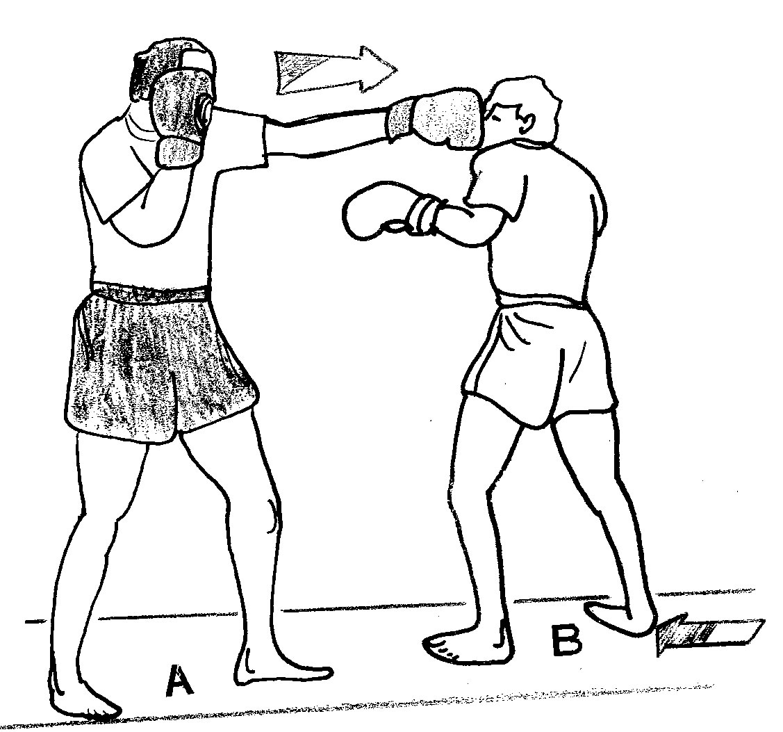 jab7.jpg